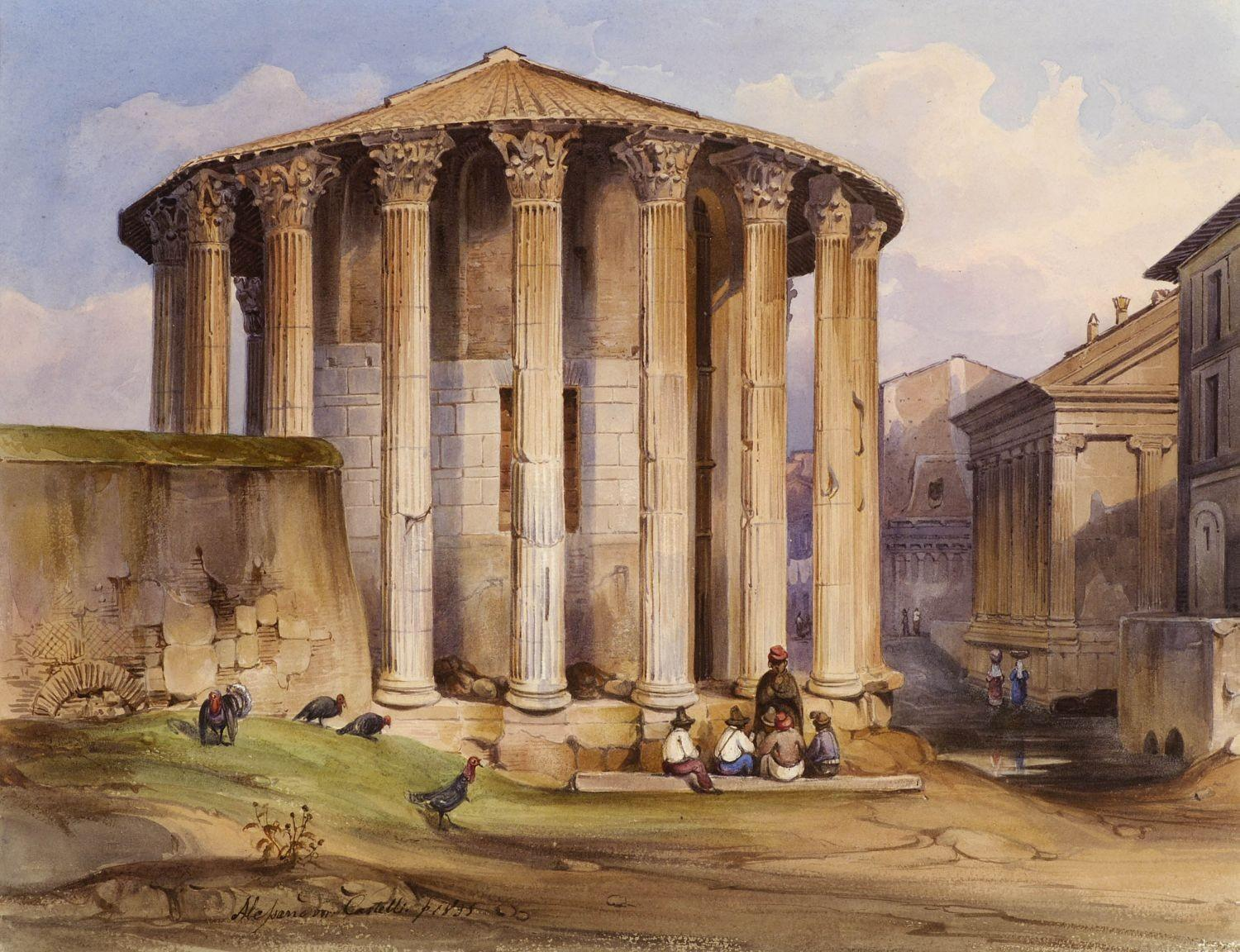 Rom - Blick auf den Vestatempel. Signiert und 1835 datiert. Aquarell, weiß gehöht. 25,4 x 32 cm